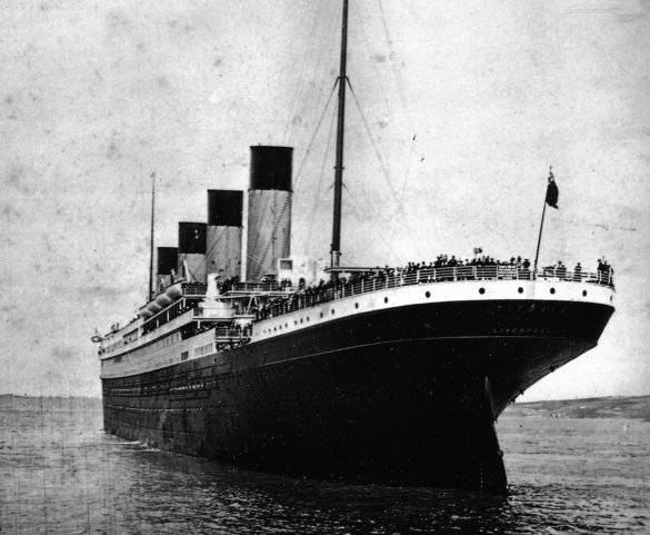 "Титаник" на стоянке в гавани Корка